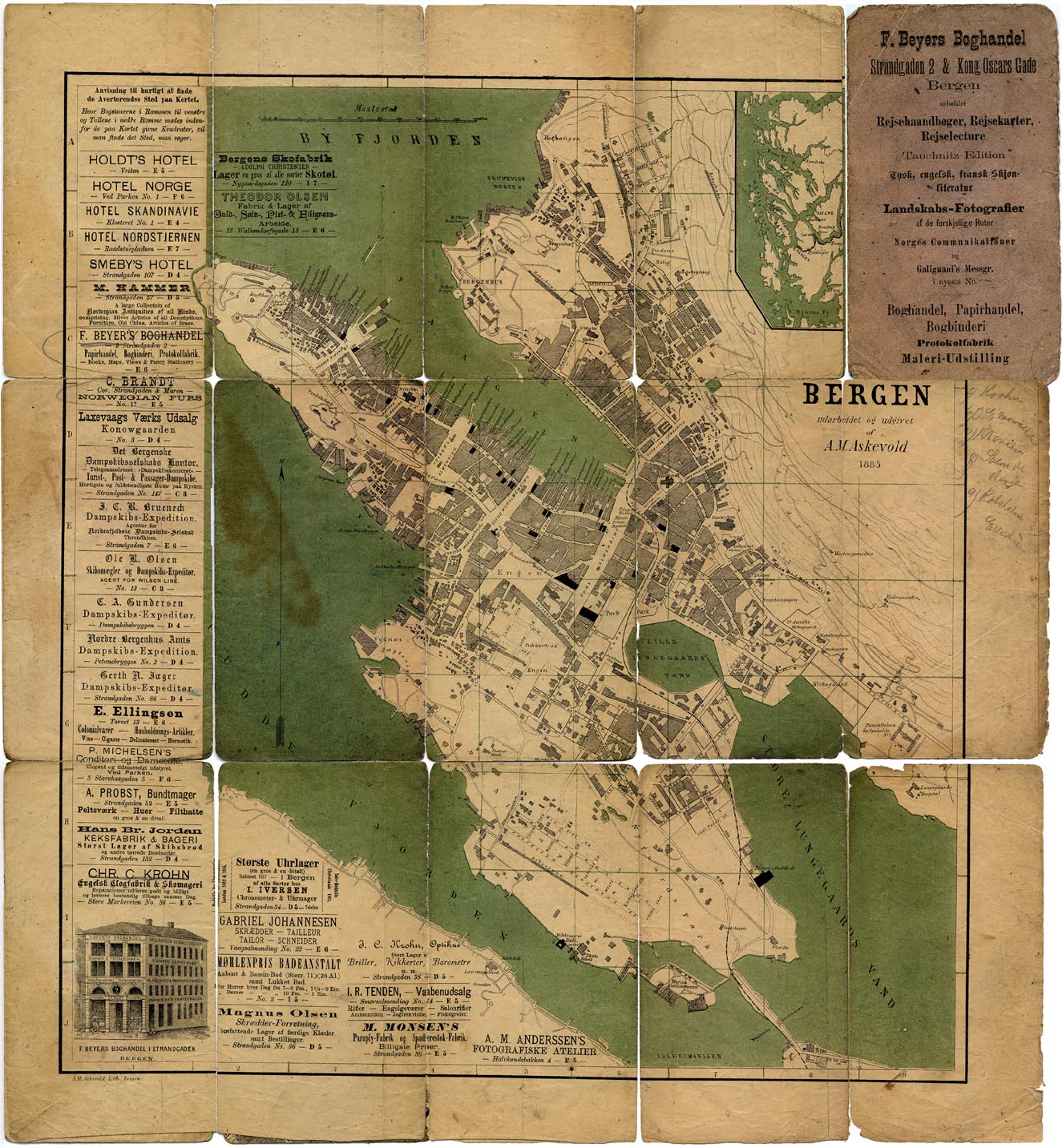 Bergen en 1885. Image ancienne.